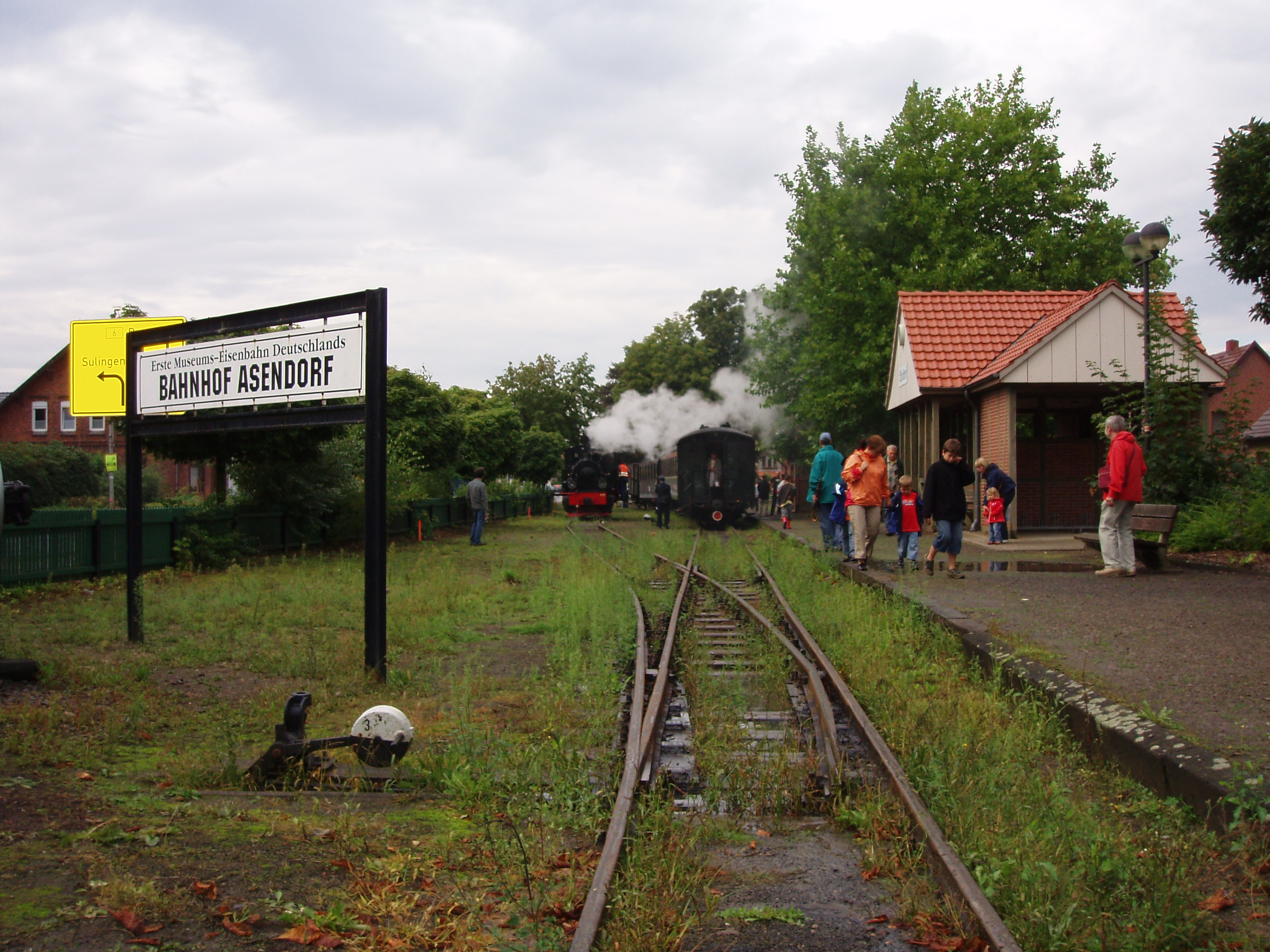 Museumseisenbahn Bruchhausen-Vilsen beim Rangieren in Asendorf